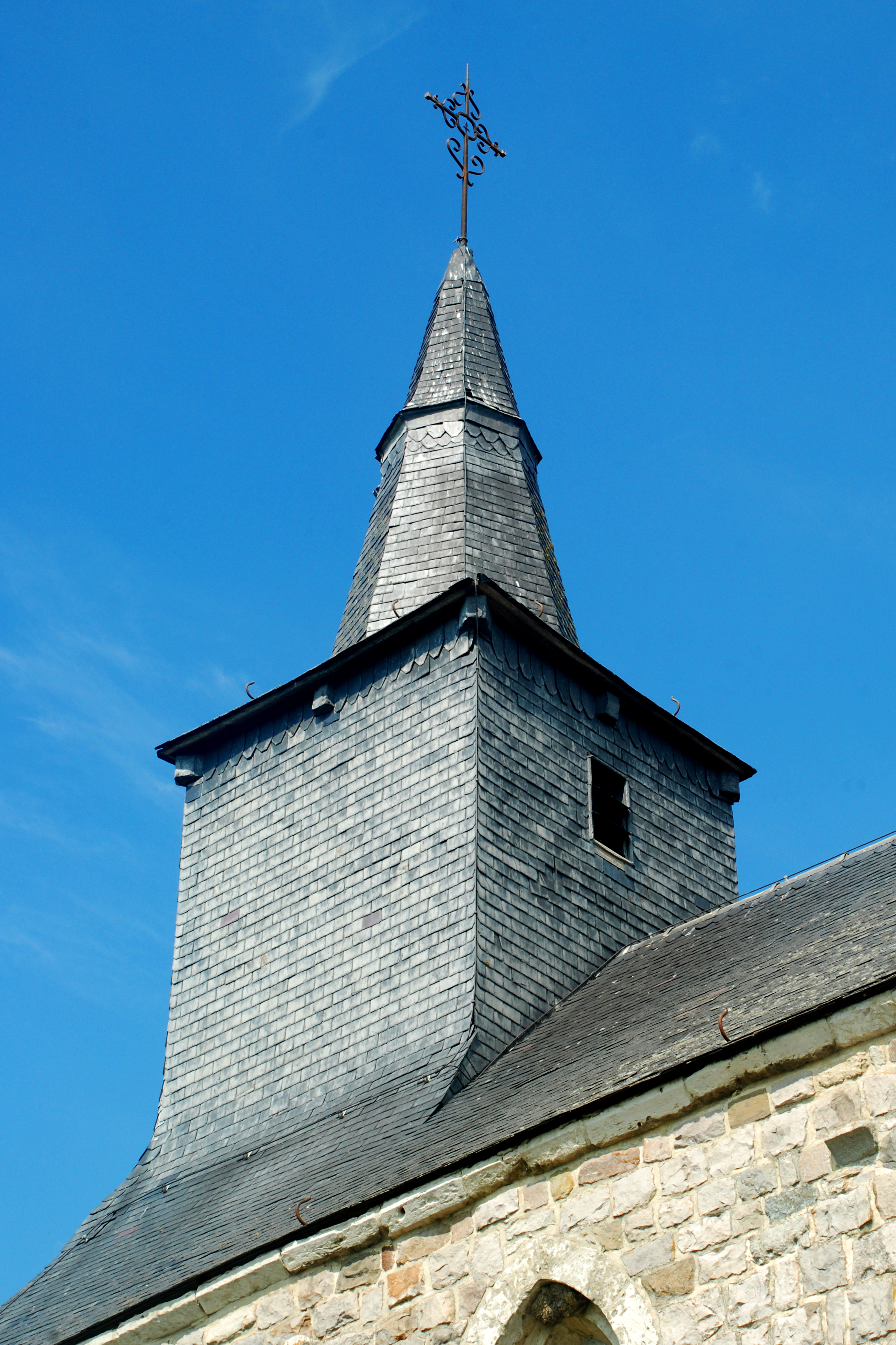 Belgique - Brabant wallon - Jodoigne - Piétrain - Chapelle Sainte-Catherine d'Herbais